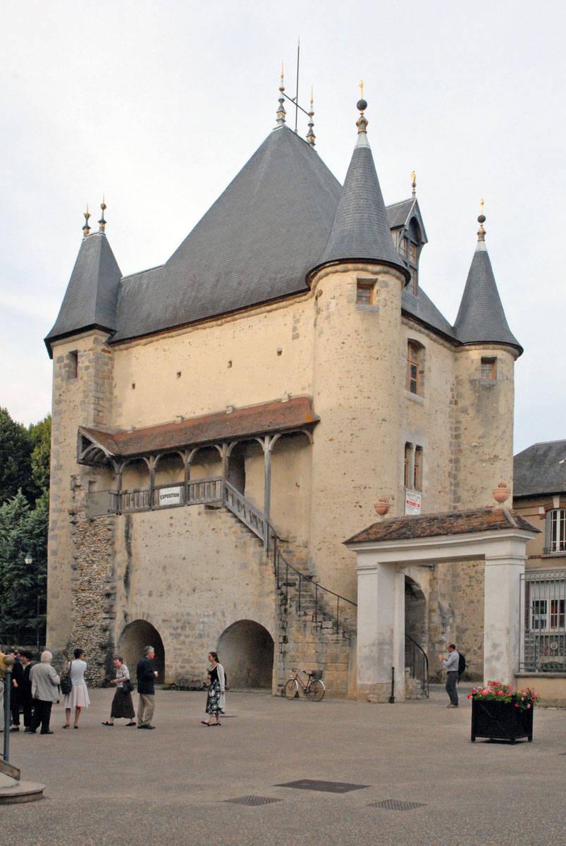 La Porte de Sens est un vestige de l’enceinte fortifiée (XIIe), elle a été aménagée en espaces d'exposition. Au premier plan, la cour de l'Europe devant l'hôtel de ville.